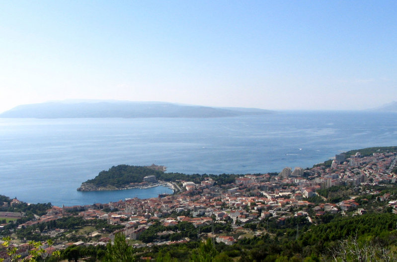 Makarska (Croatia) from Biokovo